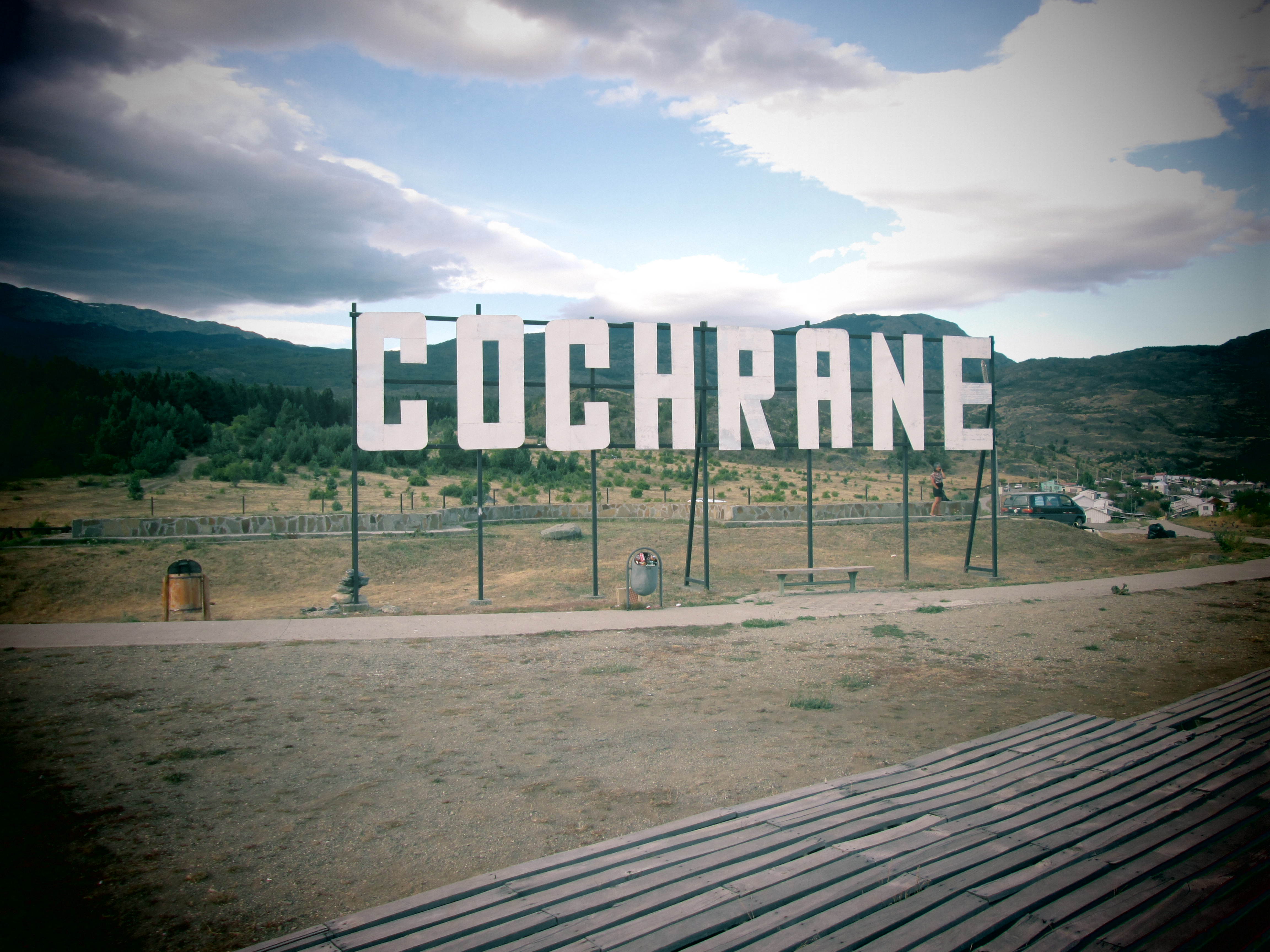 Letrero de la ciudad de Cochrane, Región de Aysén, Chile.